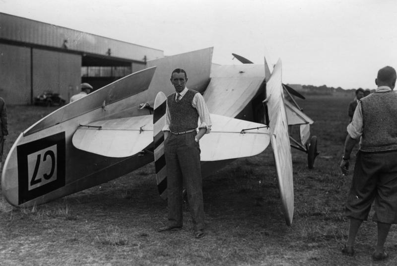 Arado L II, Berlin, Deutschlandflug, Theo Osterkamp Deutschlandflug 1931 [Theodor] Osterkamp ist auch mit von der Partie Abgebildete Personen: Osterkamp, Theodor: Generalmajor, Ritterkreuz (RK), Luftwaffe, Orden Pour le mérite, Deutschland (GND 124745822)